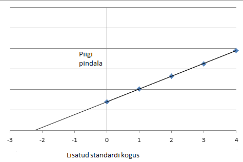 Näide kalibreerimisgraafikust kasutades lisamismeetodit.